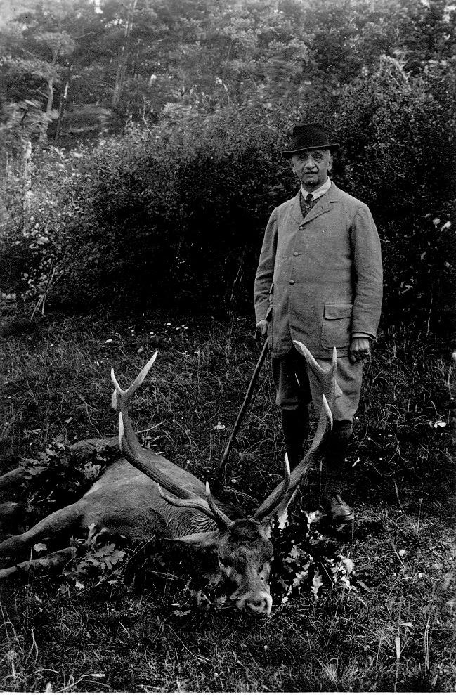 Ferdinand Bloch Baur nel 1935